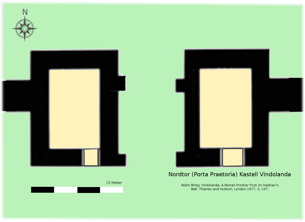 Nordtor des Kastell Vindolanda (Chesterholm, GB), Steinkastell IX, 4. Jahrhundert.